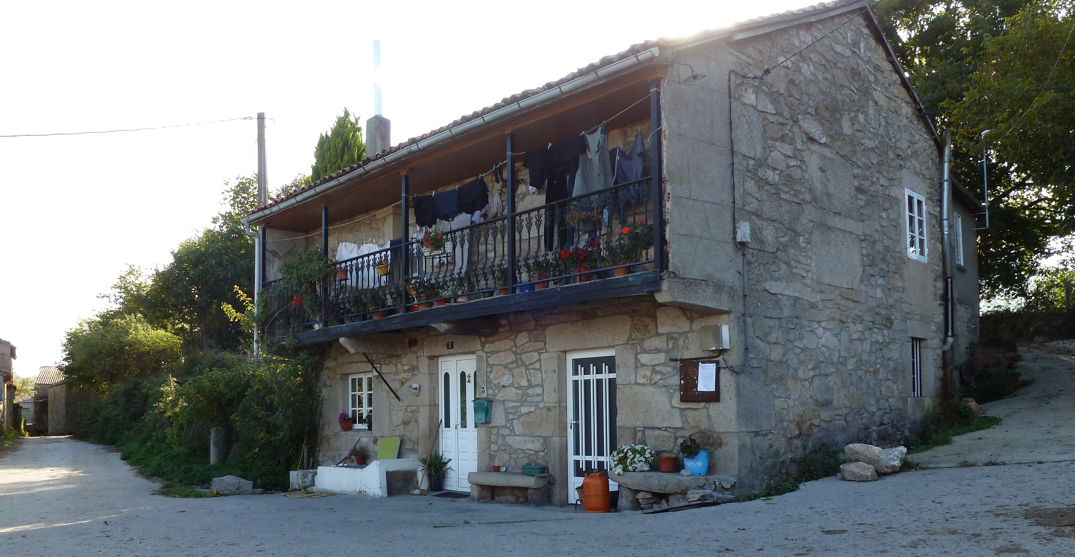 Santa Cristina, Carballedo